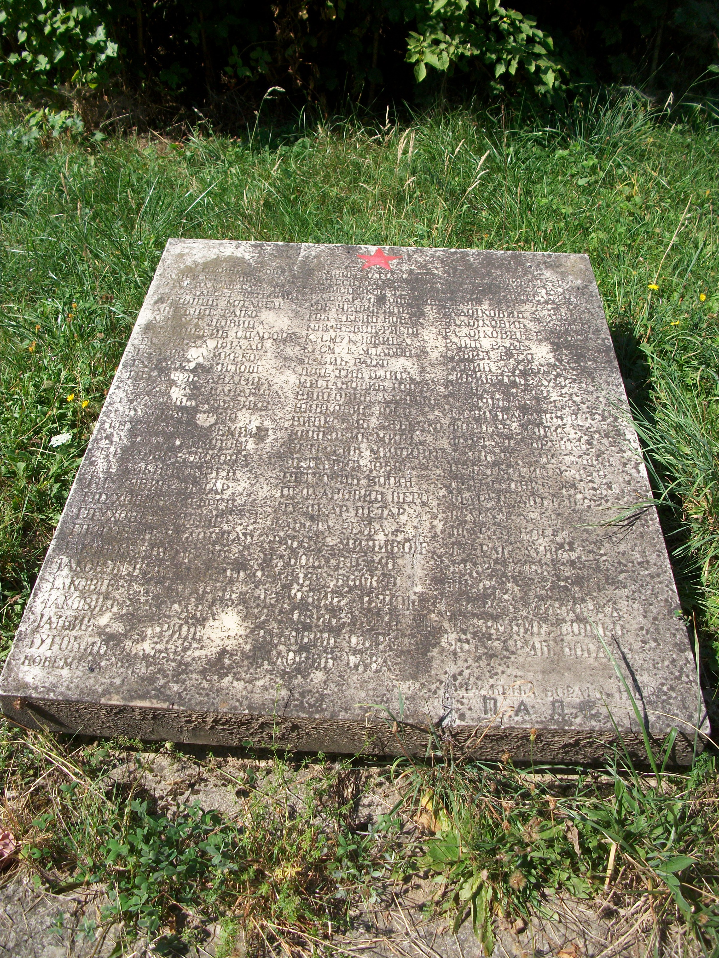 Spomenik u bivšem koncentracionom logoru Kruščica u Vitezu, Bosna i Hercegovina